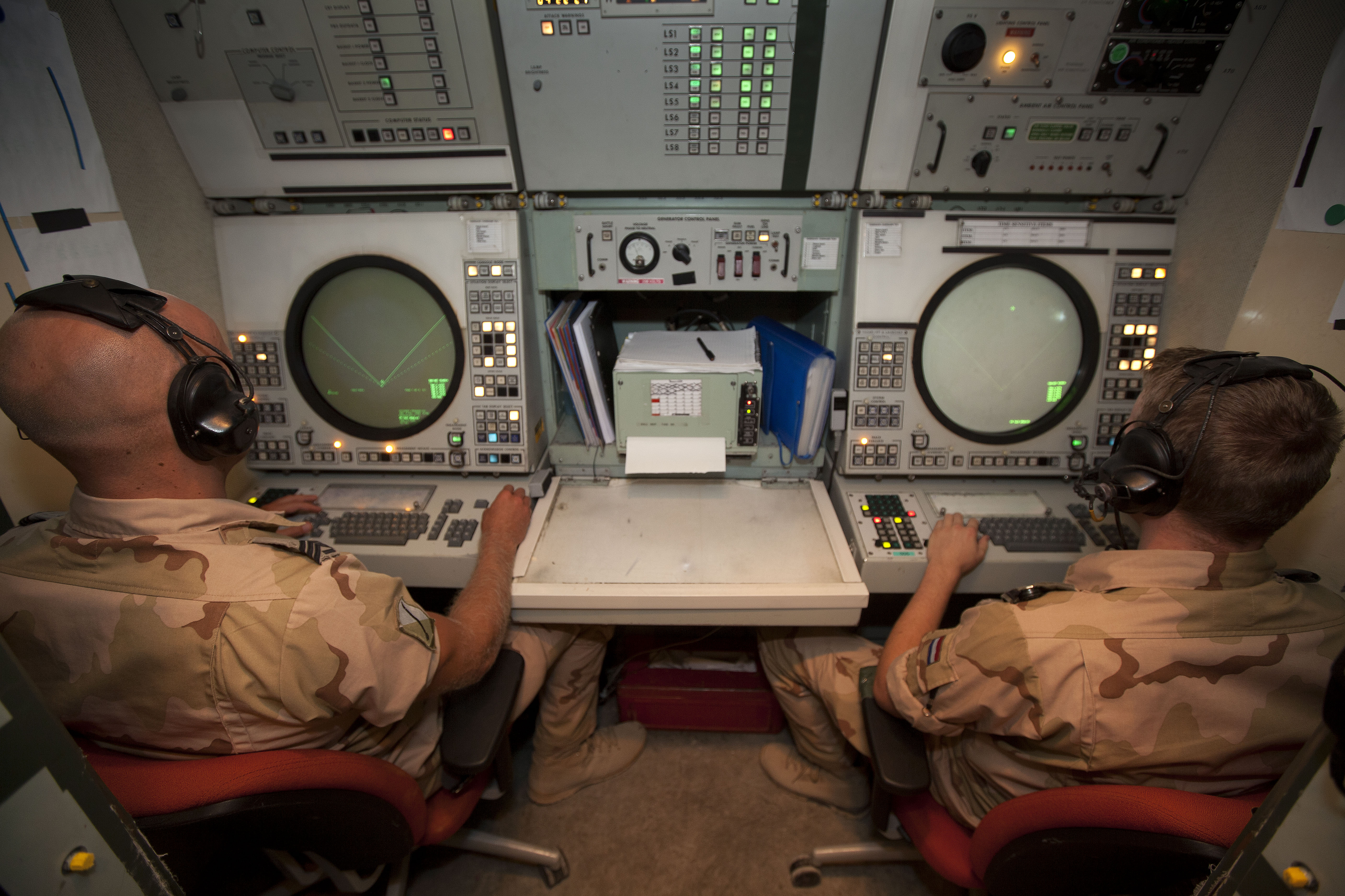 Turkije, Adana, 28 september 2013. Lucht-en landmachtpersoneel van het Defensie Grondgebonden Luchtverdedigings Commando (DGLC) participeert in de patriotmissie 'Active Fence' ter bescherming van het zuiden van Turkije. 1 (NL) TBMTF beschermt de stad Adana.